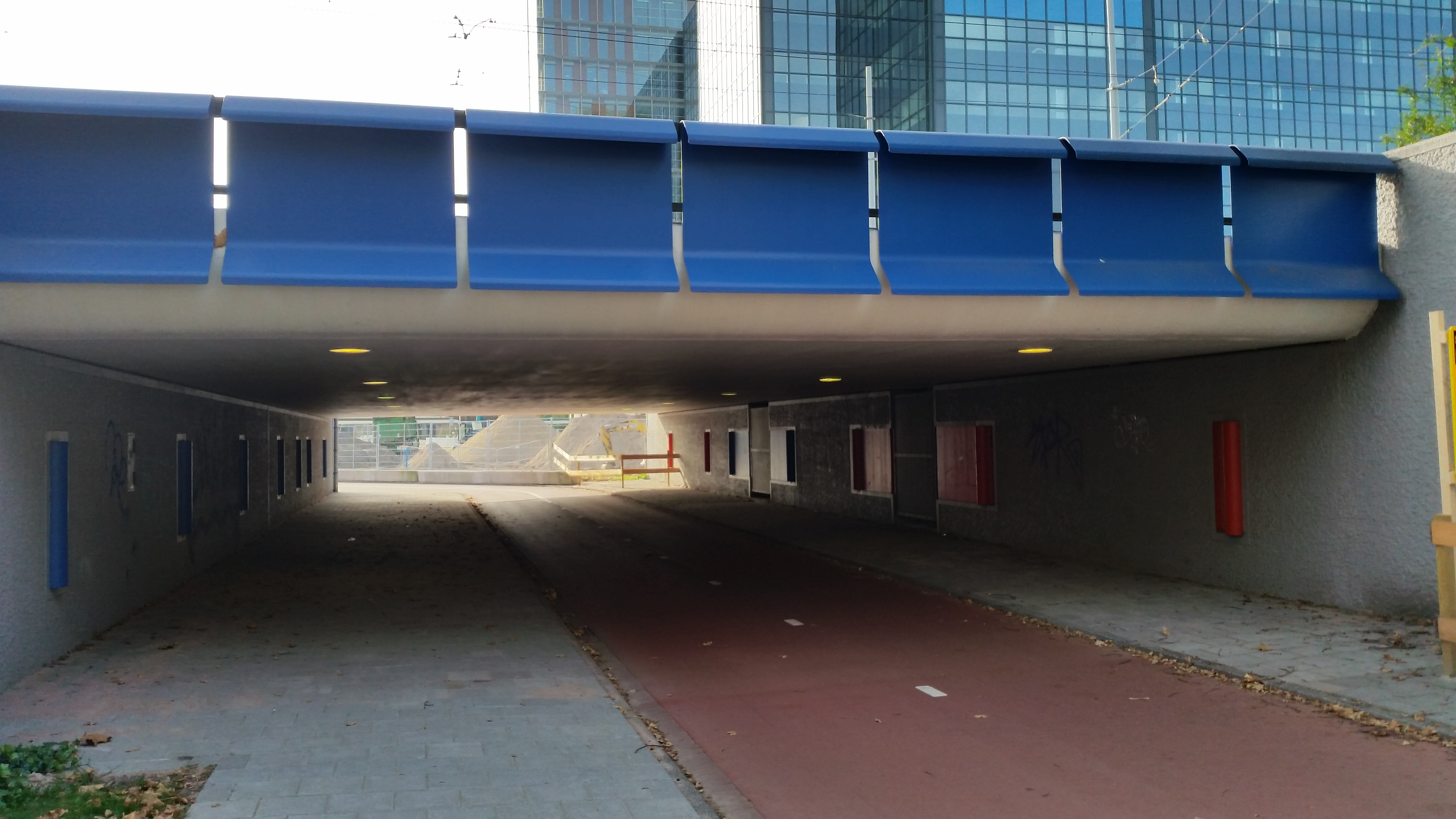 Brug 864 (in Amsterdam), zijaanzicht vanuit het noorden